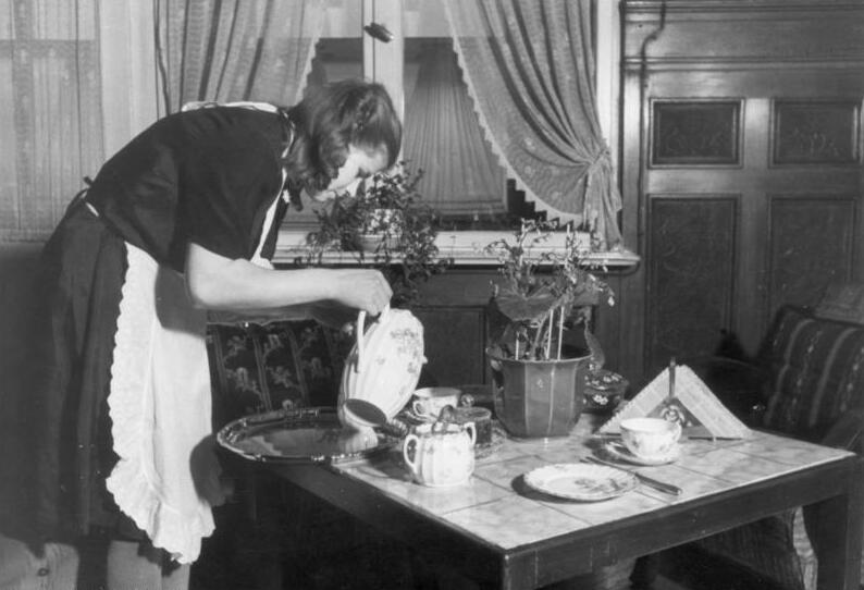 This description has been identified as biased or incorrect: Nazi propaganda / NS-Propaganda„Ostarbeiterin in Deutschland Deutschland Januar 1945 Wie ergeht es der Ostarbeiterin Helena B. aus Kiew in Deutschland? ... dann deckt sie den Frühstückstisch mit besonderer Liebe und Aufmerksamkeit. SS-PK Bogner“